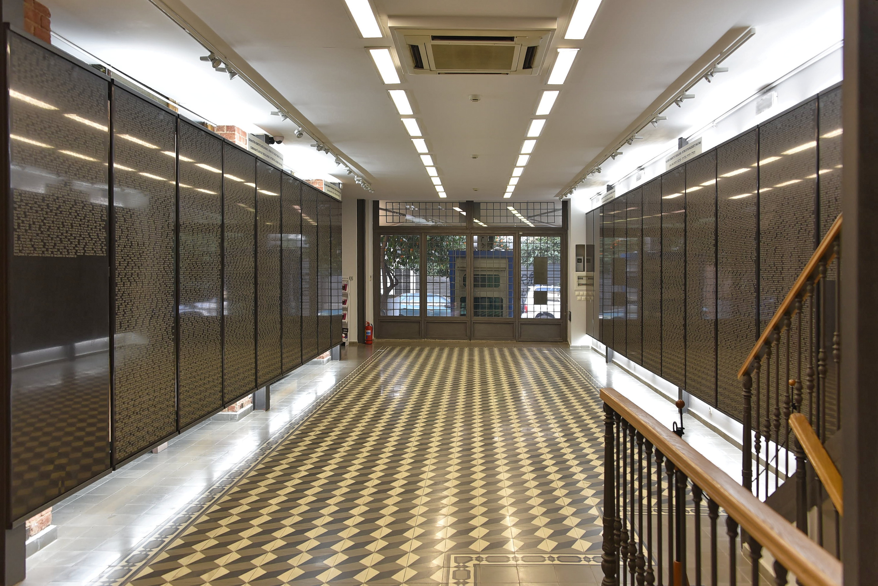 Jewish Museum Thessaloniki - Victims of the Holocaust